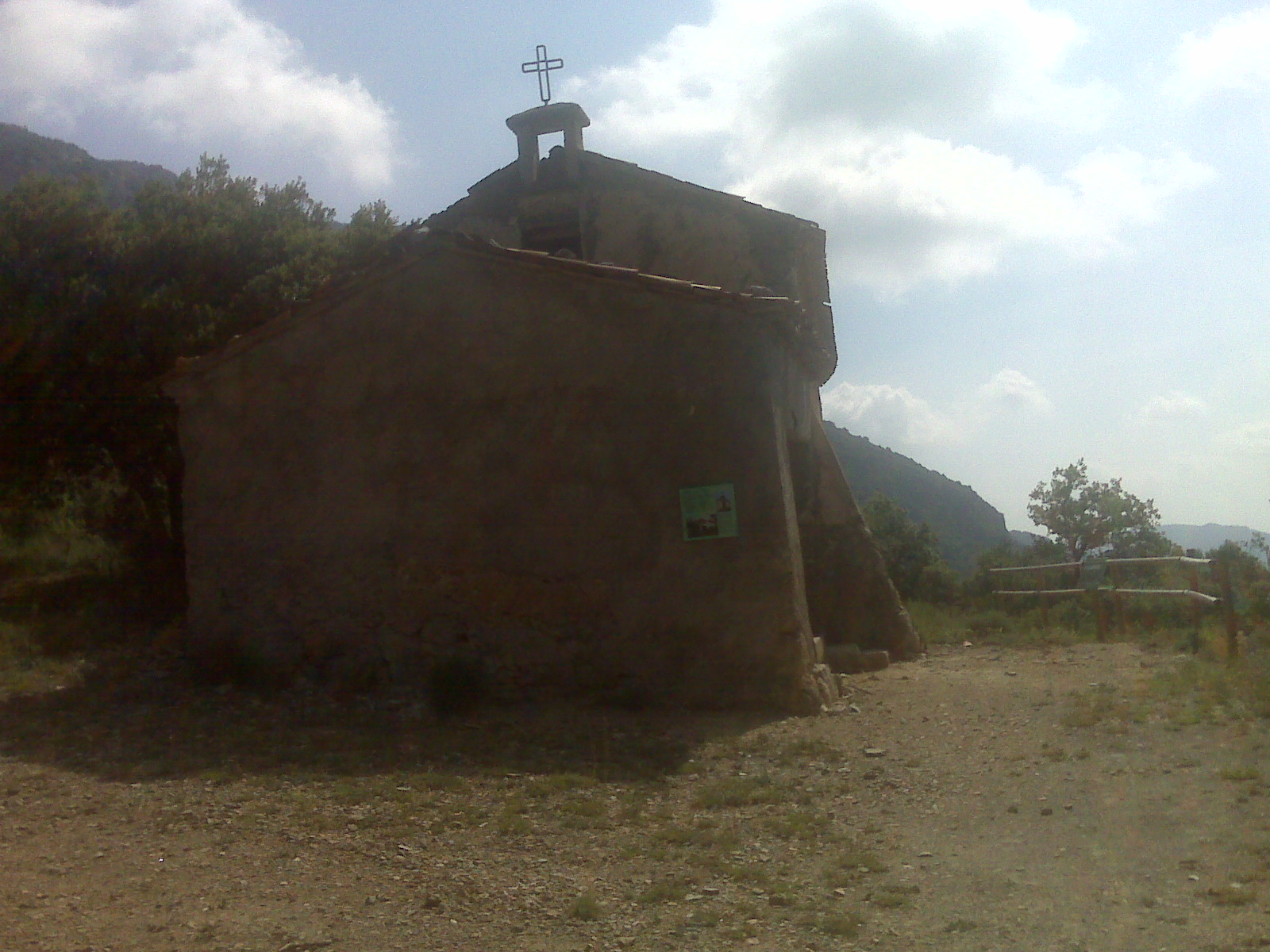 Vista de l'ermita de Sant Sebastià, situada en el camí de Santa Maria de Meià a la font del Reguer